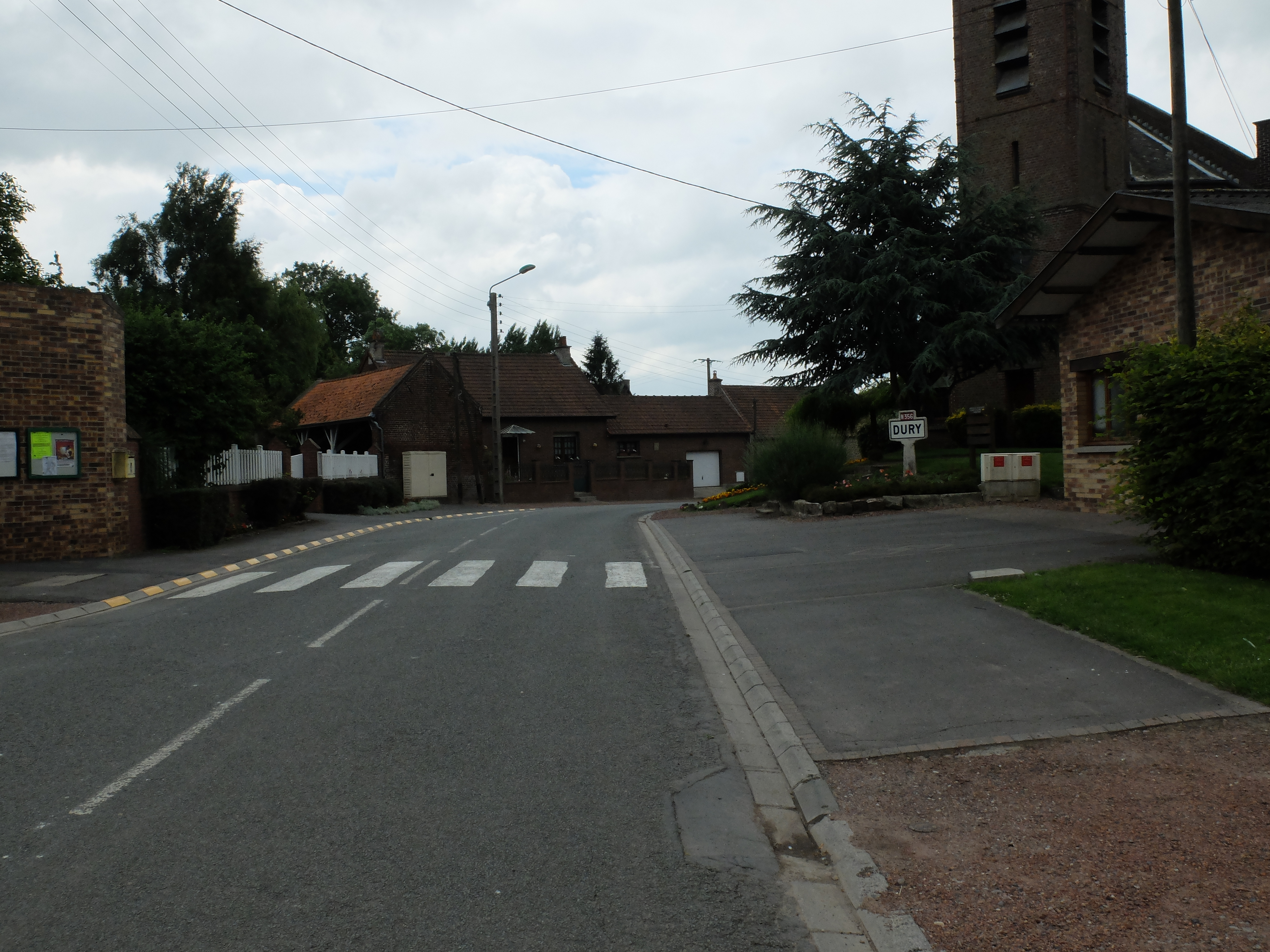 Vue de la rue de la mairie de Dury (Pas-de-Calais).